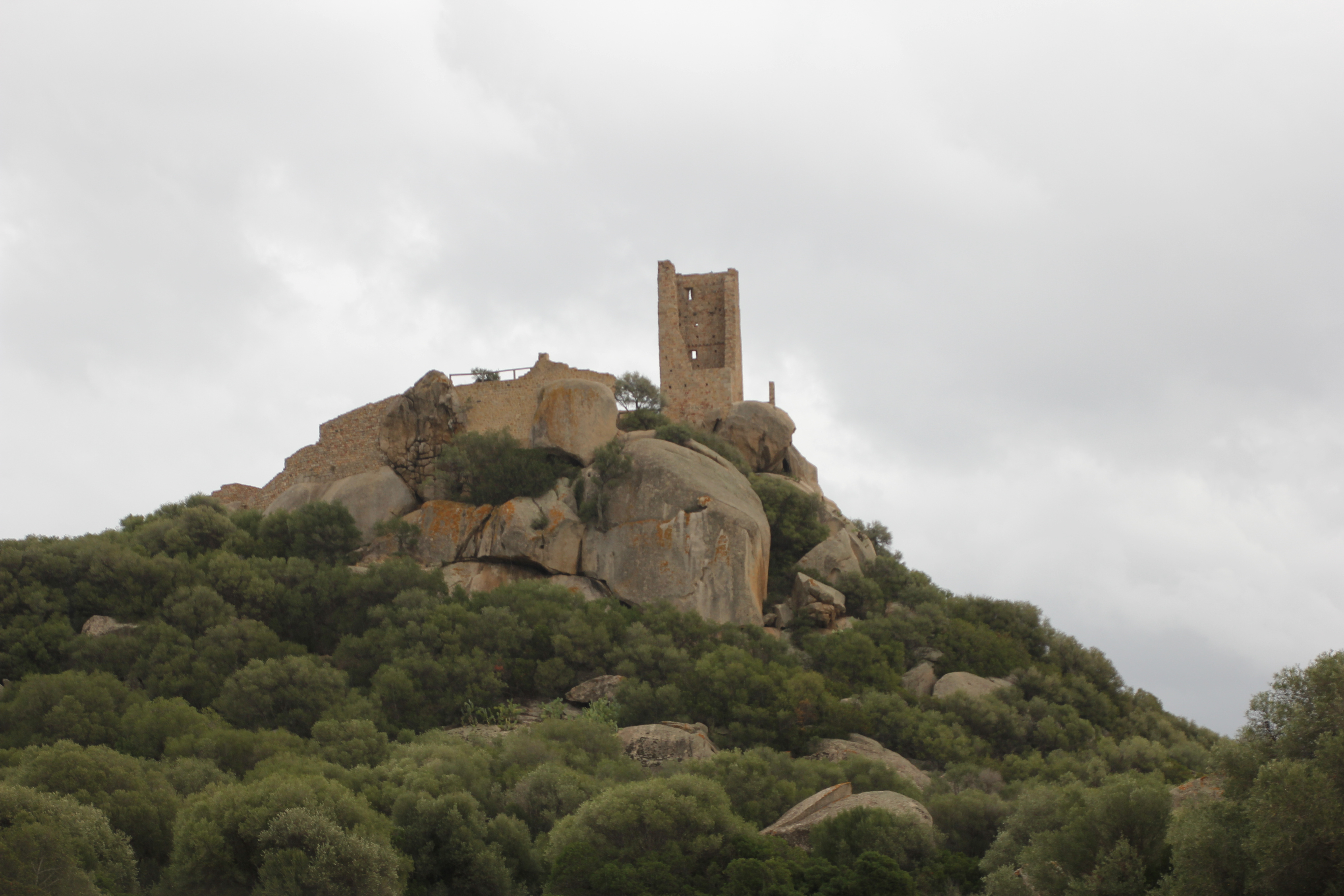 Olbia, castello di Pedres